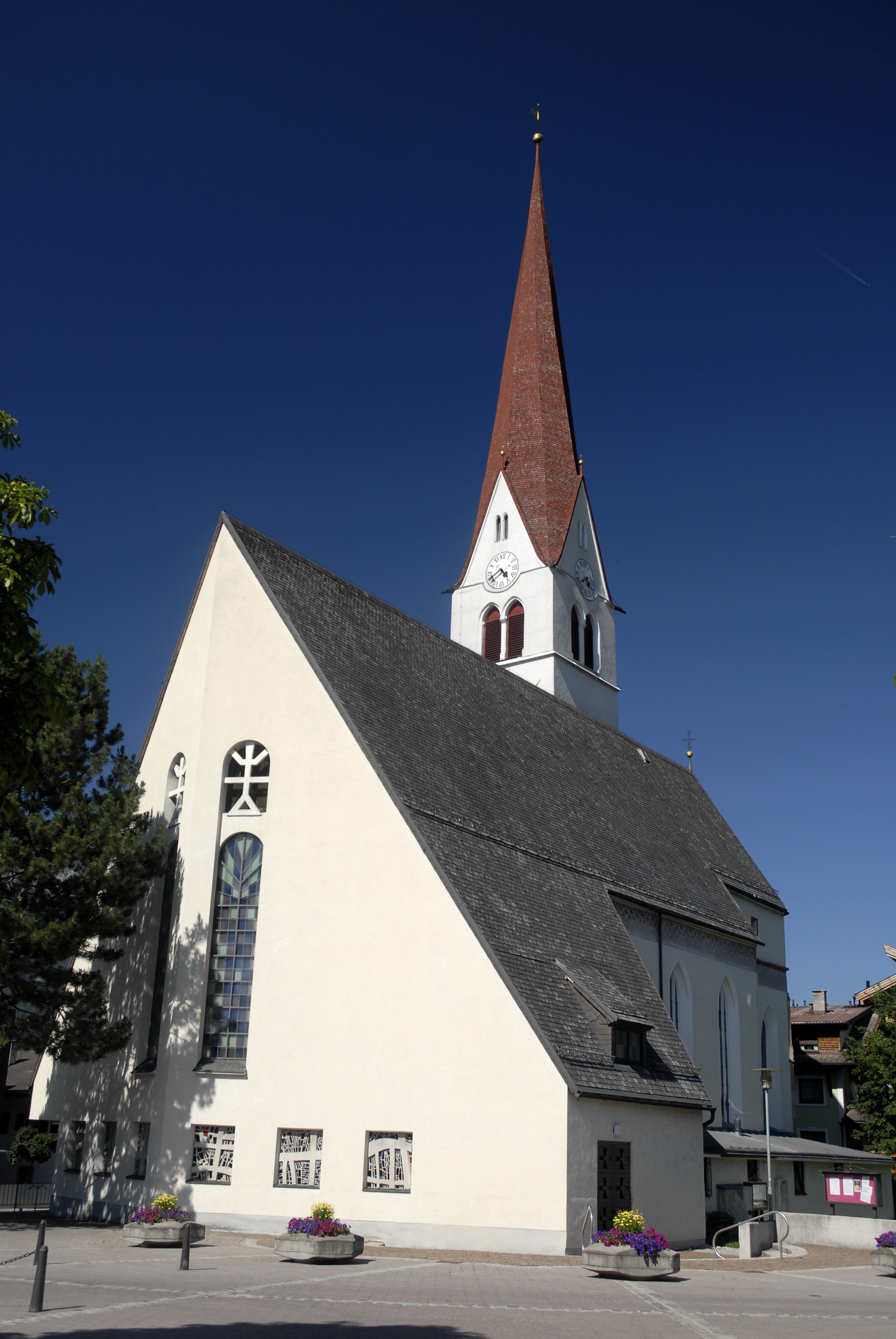 Pfarrkirche von Volders, geweiht dem Hl. Johannes dem Täufer